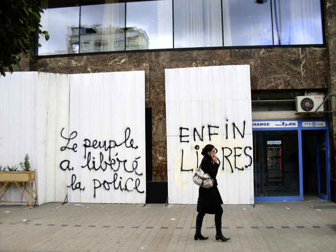 Grafitis suite à la révolution des Jasmins